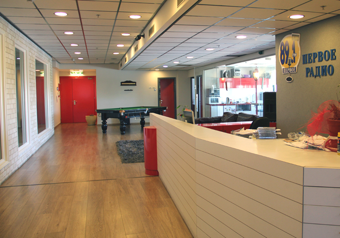 Офис радиостанции